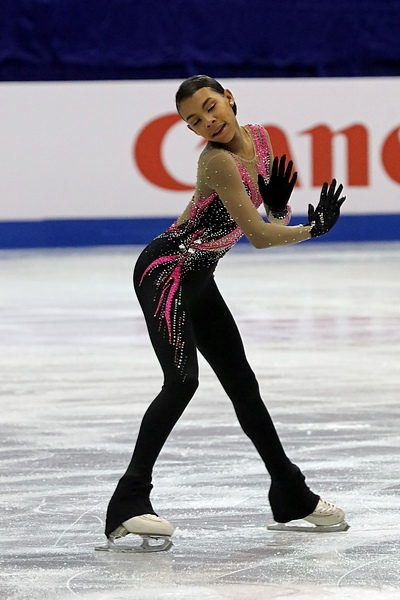 Старр Андреус (США) на чемпионате мира среди юниоров 2017